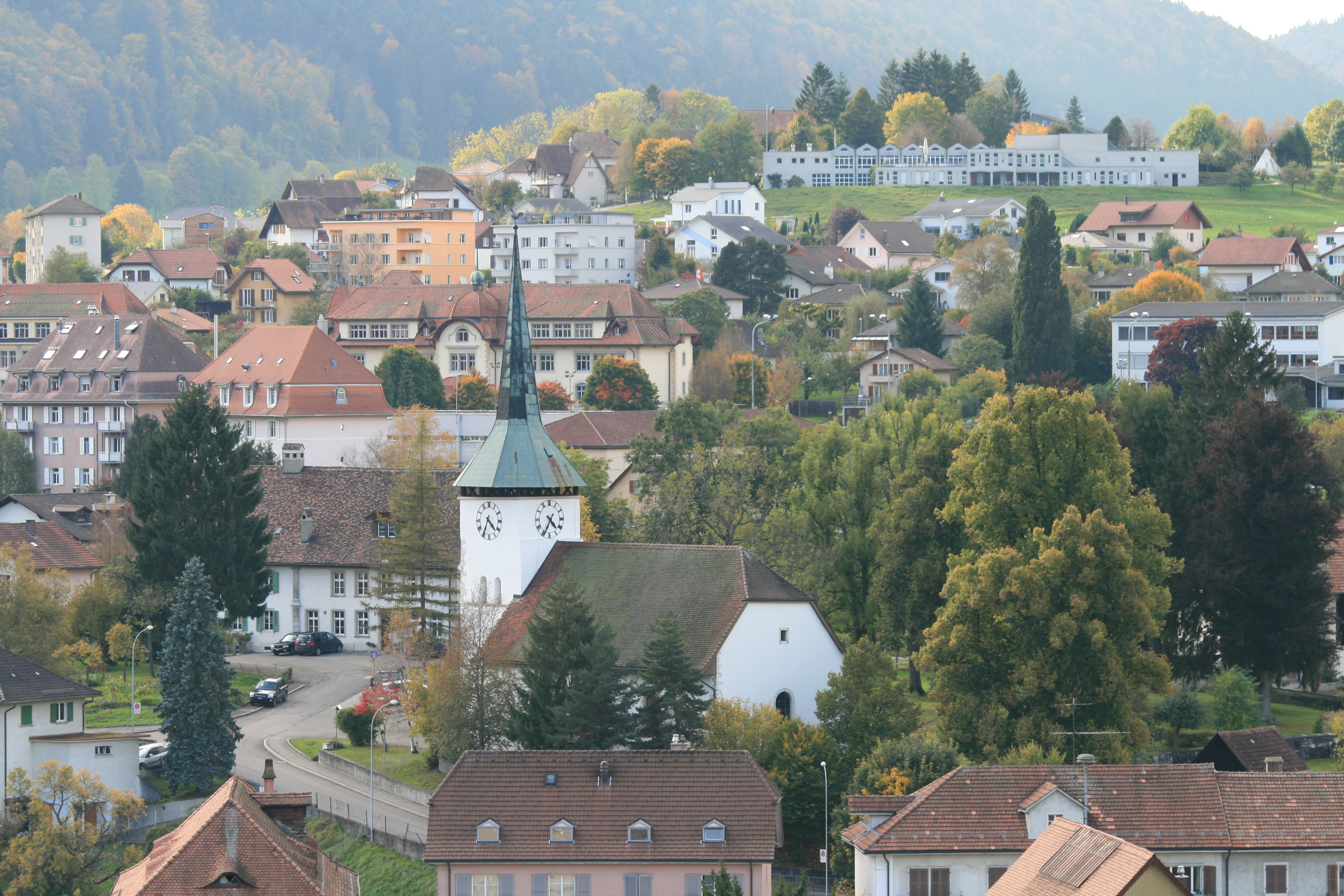 Tavannes